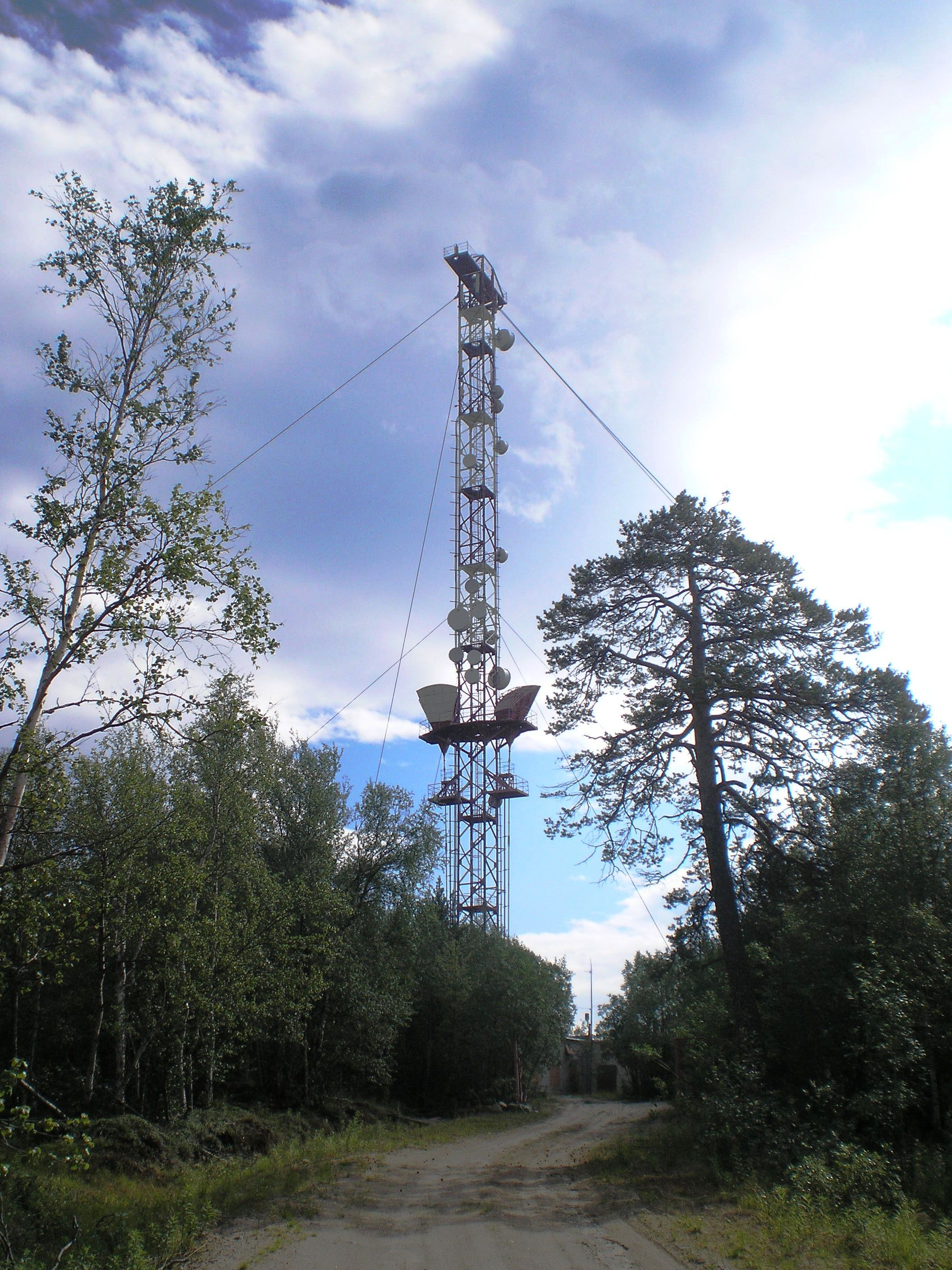 Мачта в Тайболе. 2010 г.